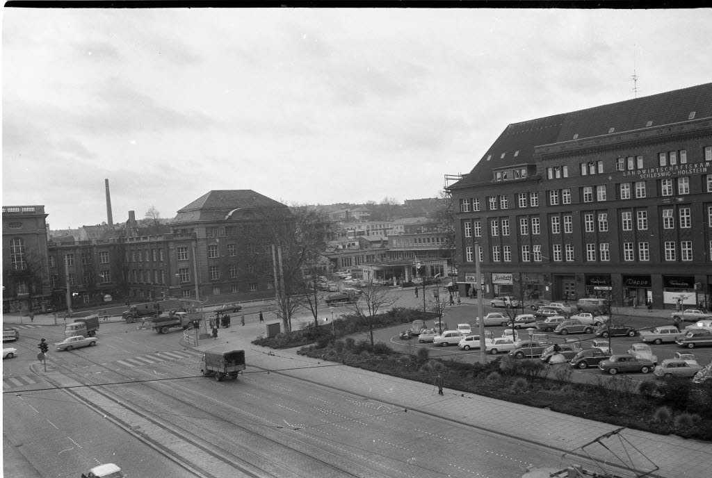 Blick von der Andreas-Gayk-Straße. Im Bild rechts die Landwirtschaftskammer in der Holstenstraße 106-108, davor der Parkplatz am Holstenplatz. Im Hintergrund links das Thaulow-Museums.